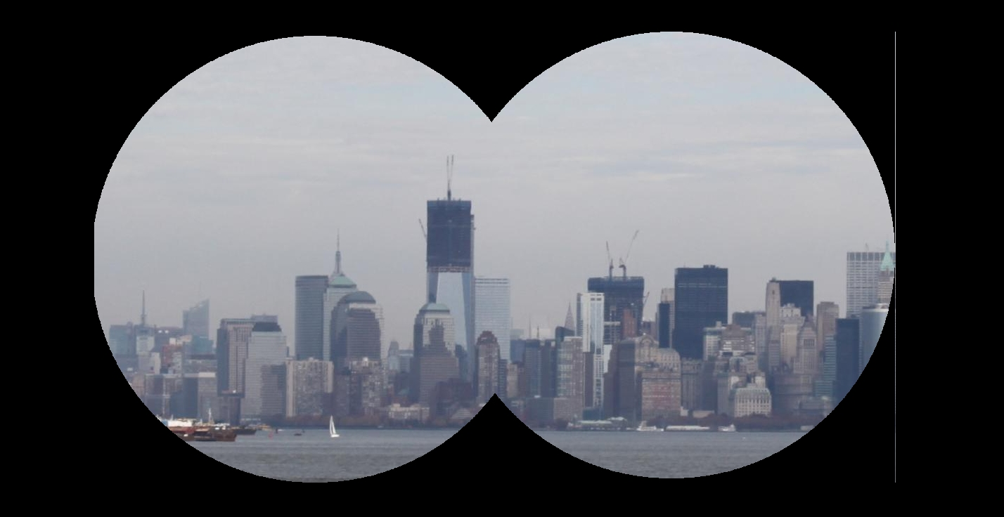 Copy from picture by Jean-Hervé BARBIÉ, shown through binocular